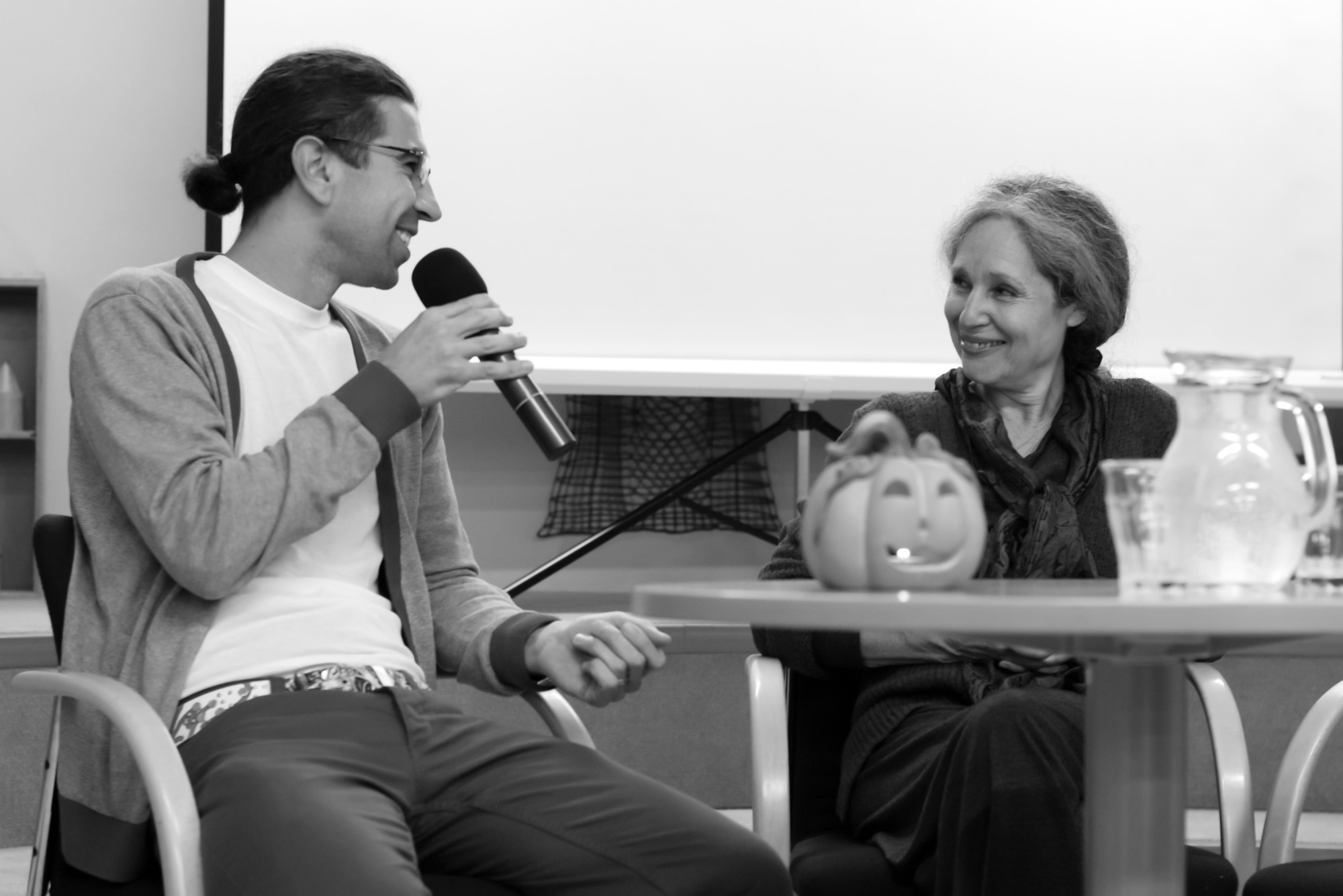 Táňa Fischerová v Sedlčanech